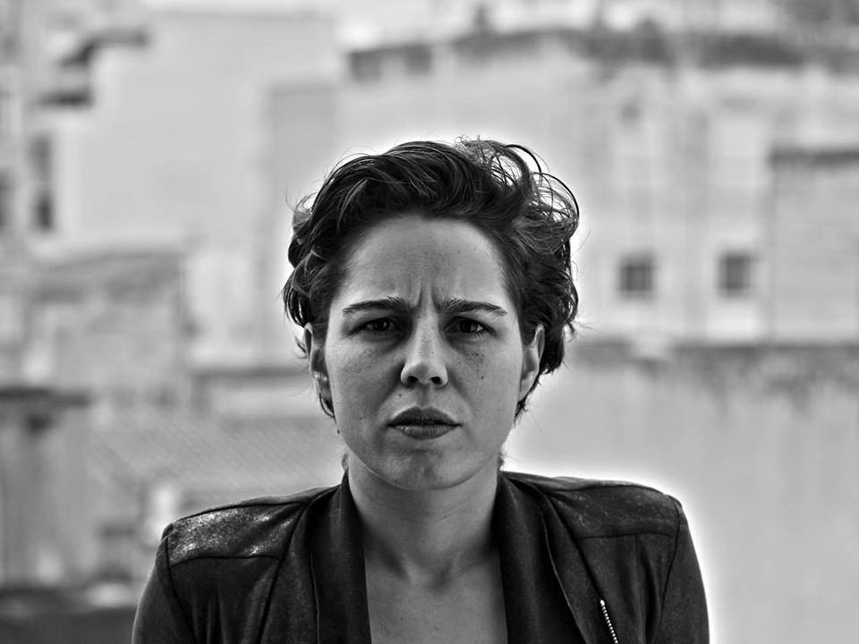 Traductora, escriptora i músic